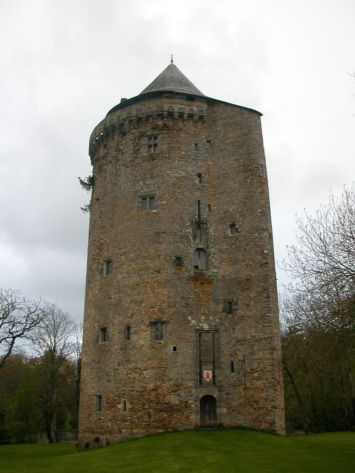 La Tour Duguesclin, ancien donjon du château de Grand-Fougeray